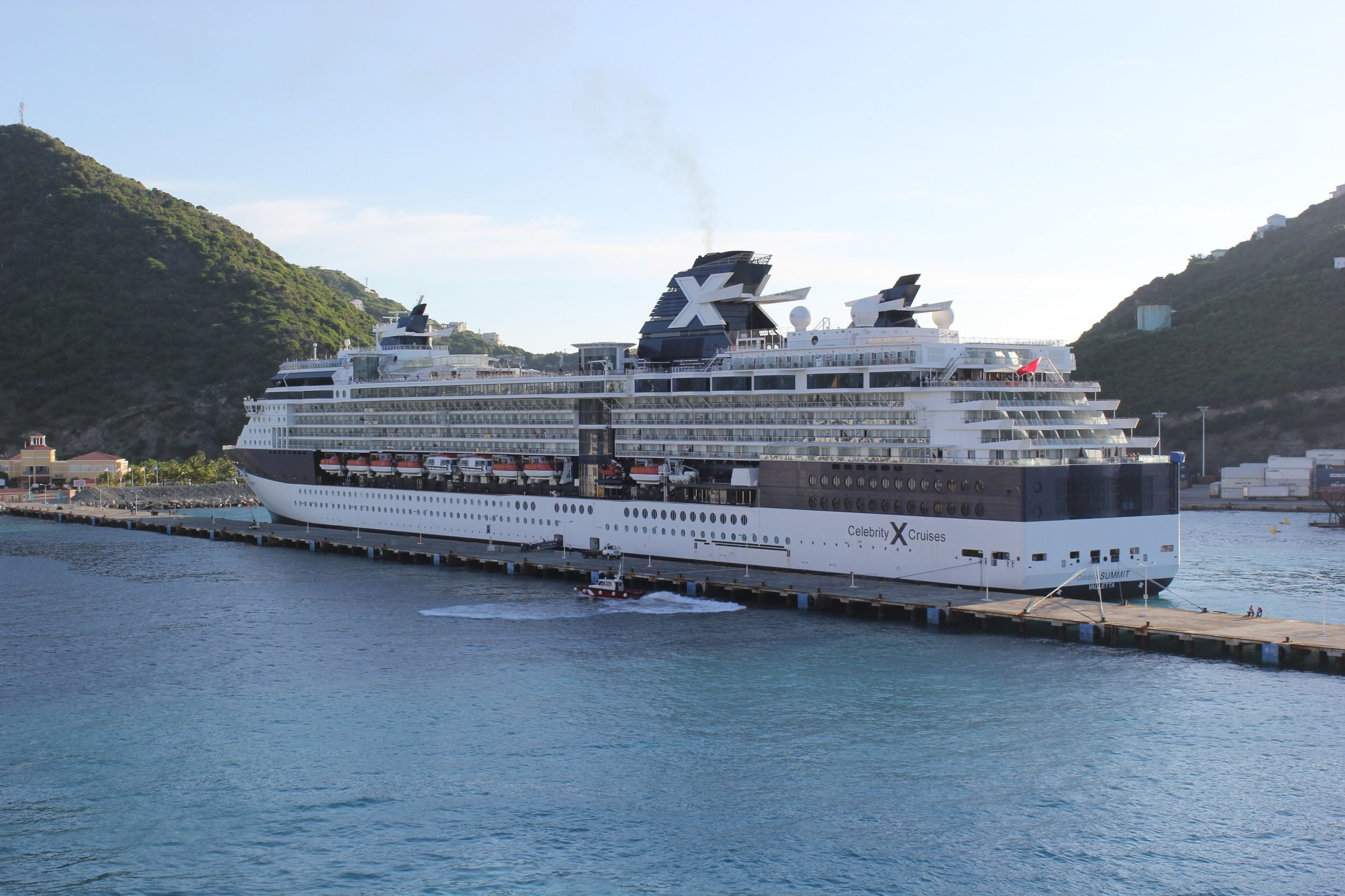 St Maarten